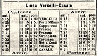 Vercelli-Casale, 1888-01-03 timetable